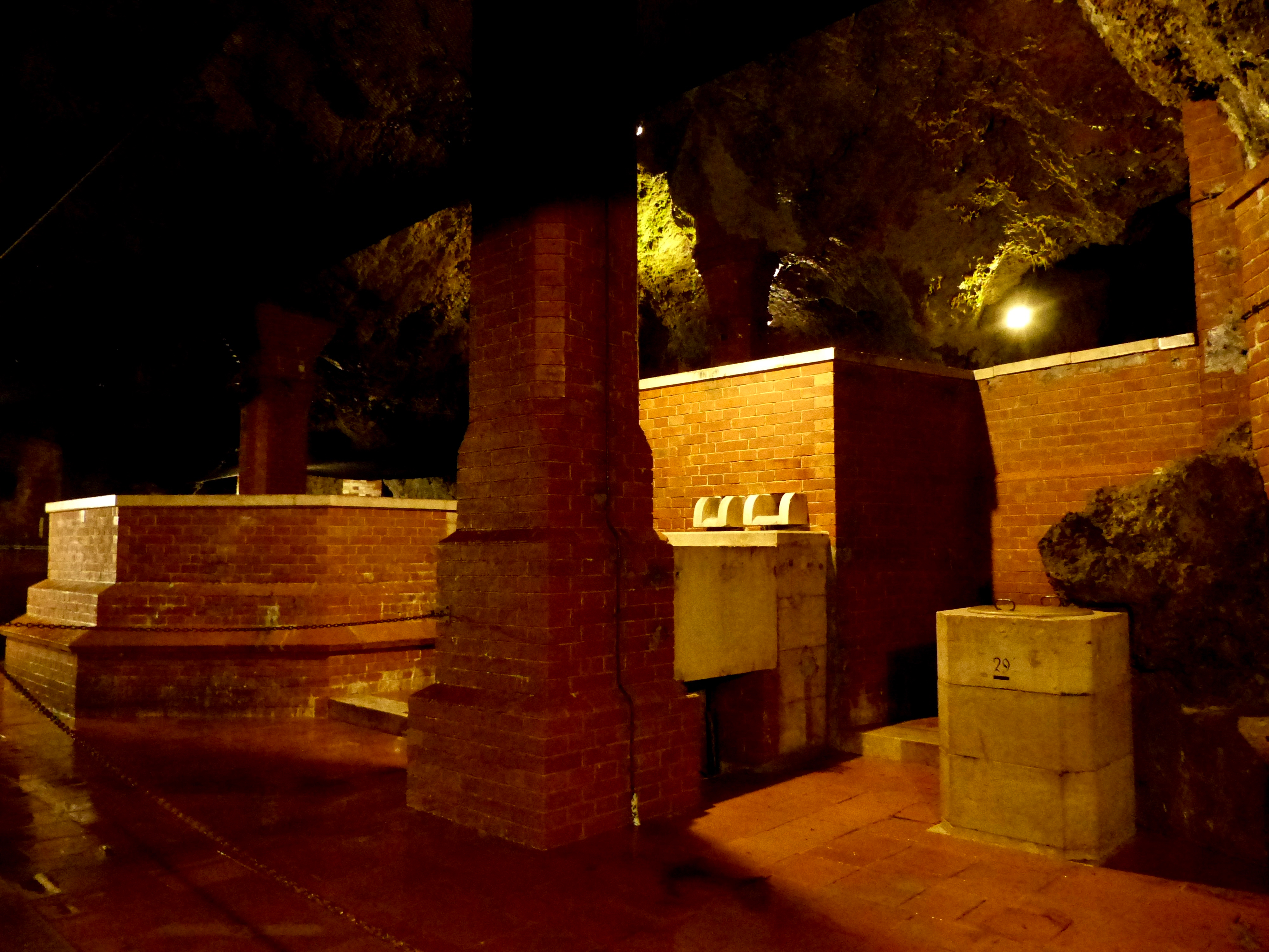 Geotop Quellenbau der Alten Saline in Bad Reichenhall